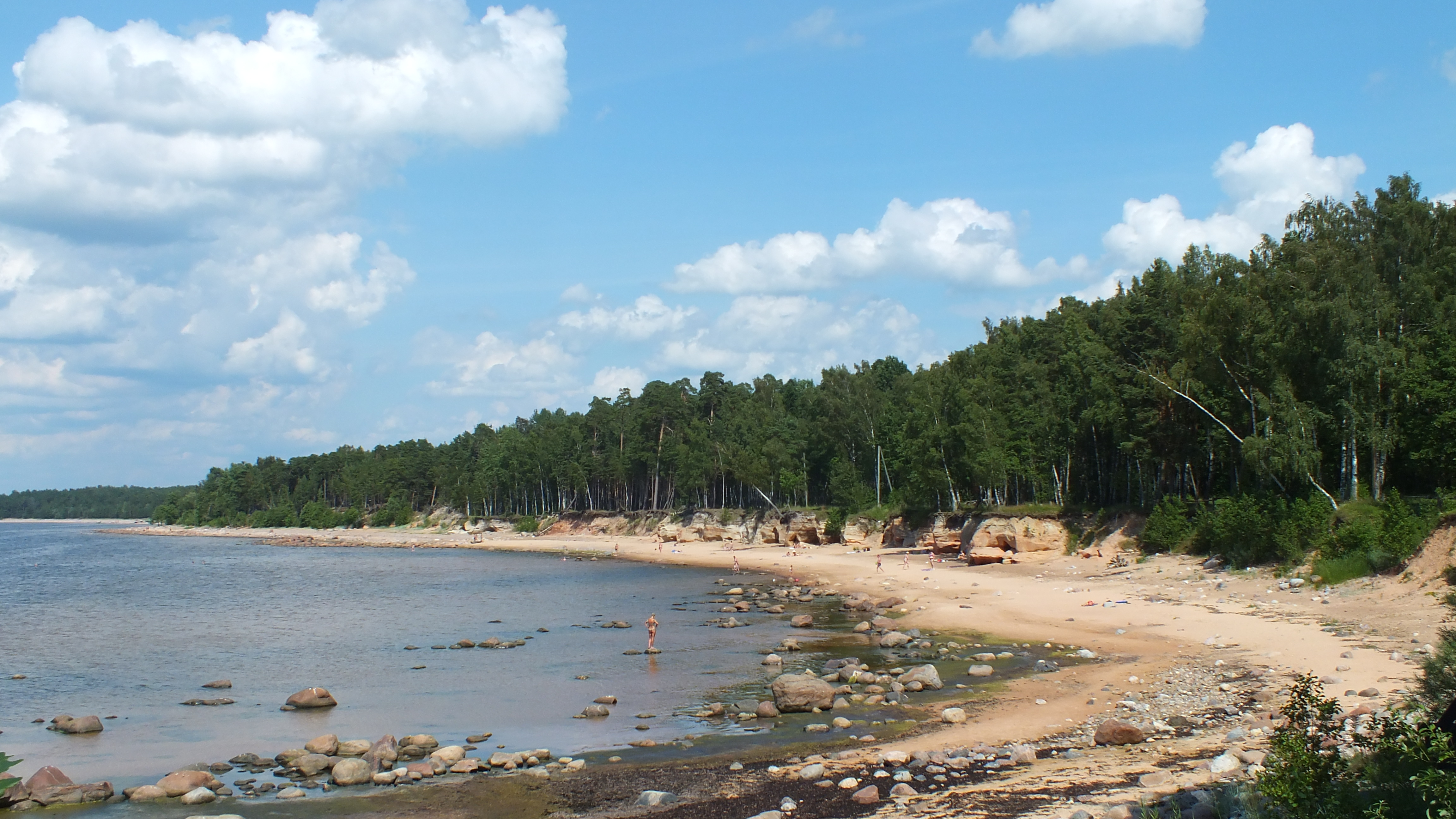 Veczemju klintis